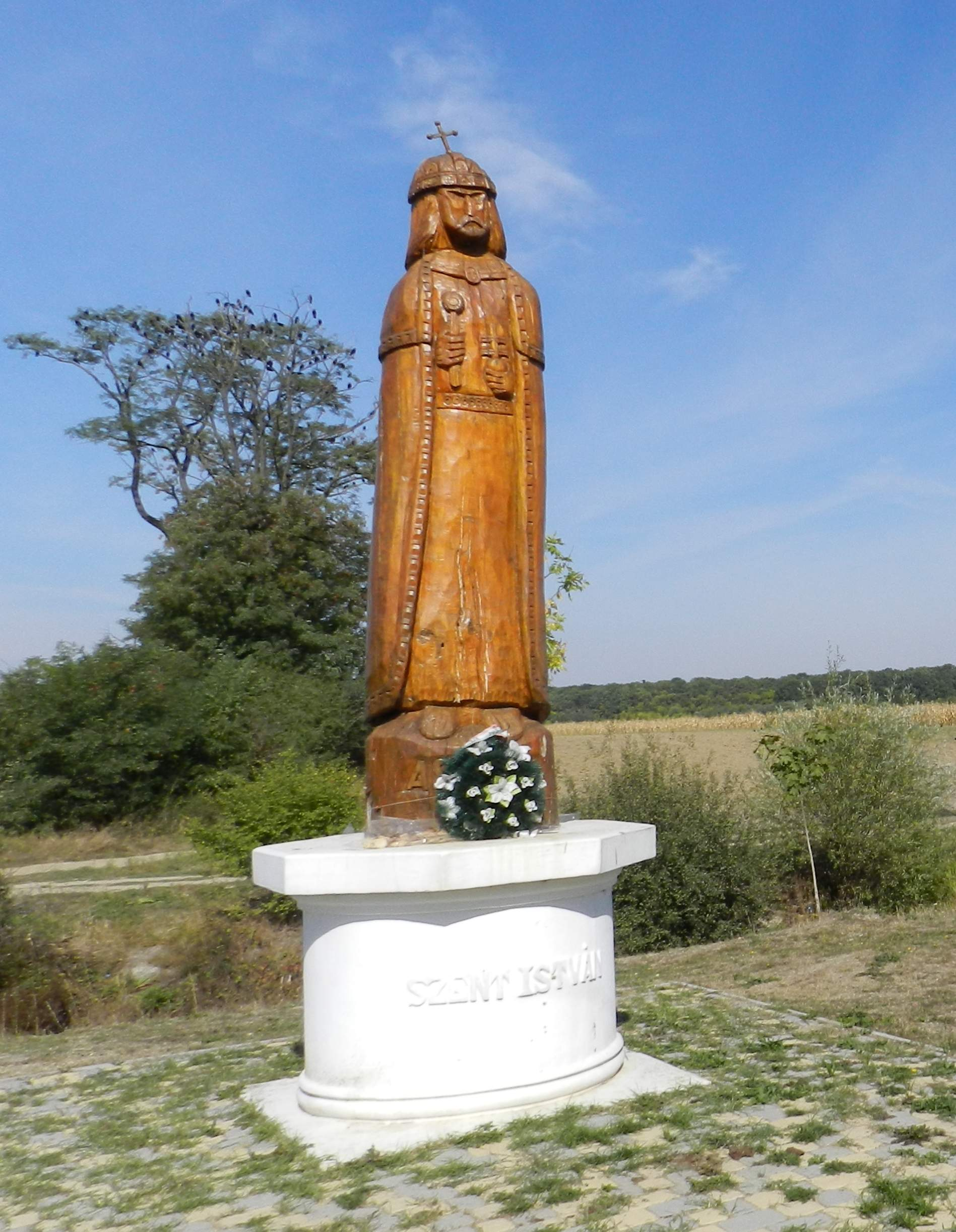 Скульптура Святого Іштвана, 2006 р., АстейAsztély község Ukrajnában, Kárpátalján, a Beregszászi járás